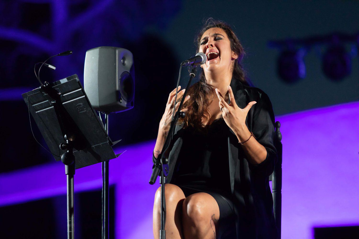 La cantante Alba Molina volvió ayer a bucear en su herencia flamenca, en el Parque Forestal de Entrevías, uno de los barrios con mayor tradición flamenca de Madrid, frente a un público entregado a la emoción y el sentimiento de una de las voces más especiales del cante español.